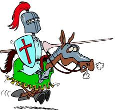 Logotip de cacera del tresor